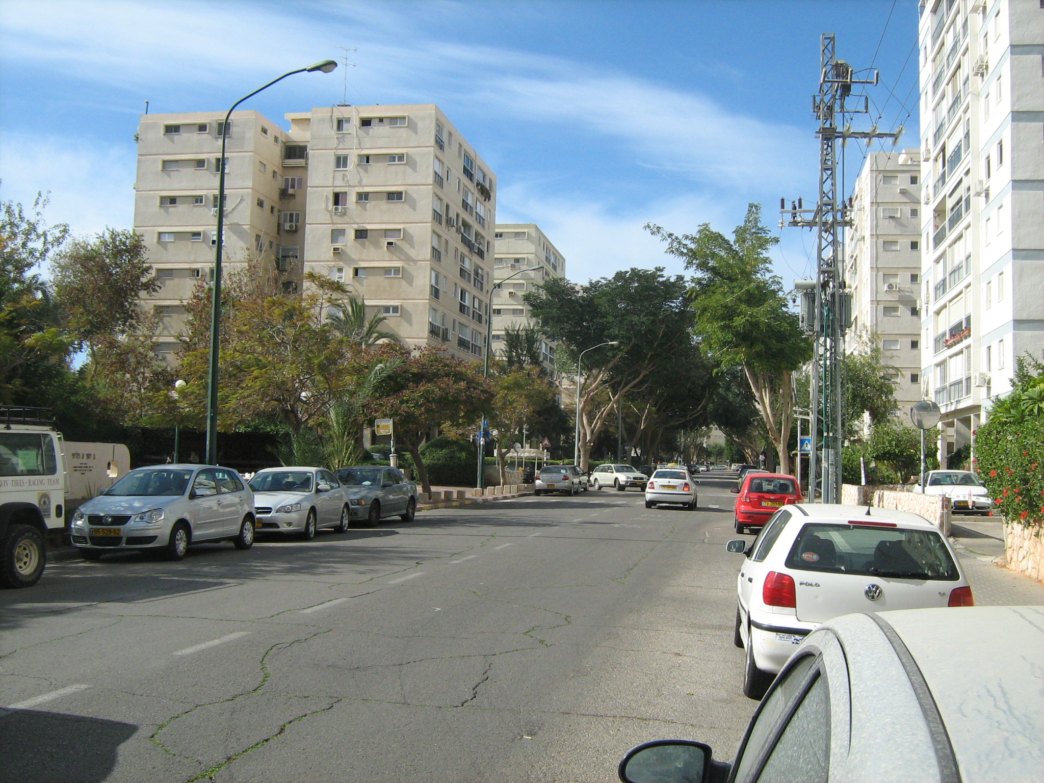 רחוב הרב אשי בנווה אביבים